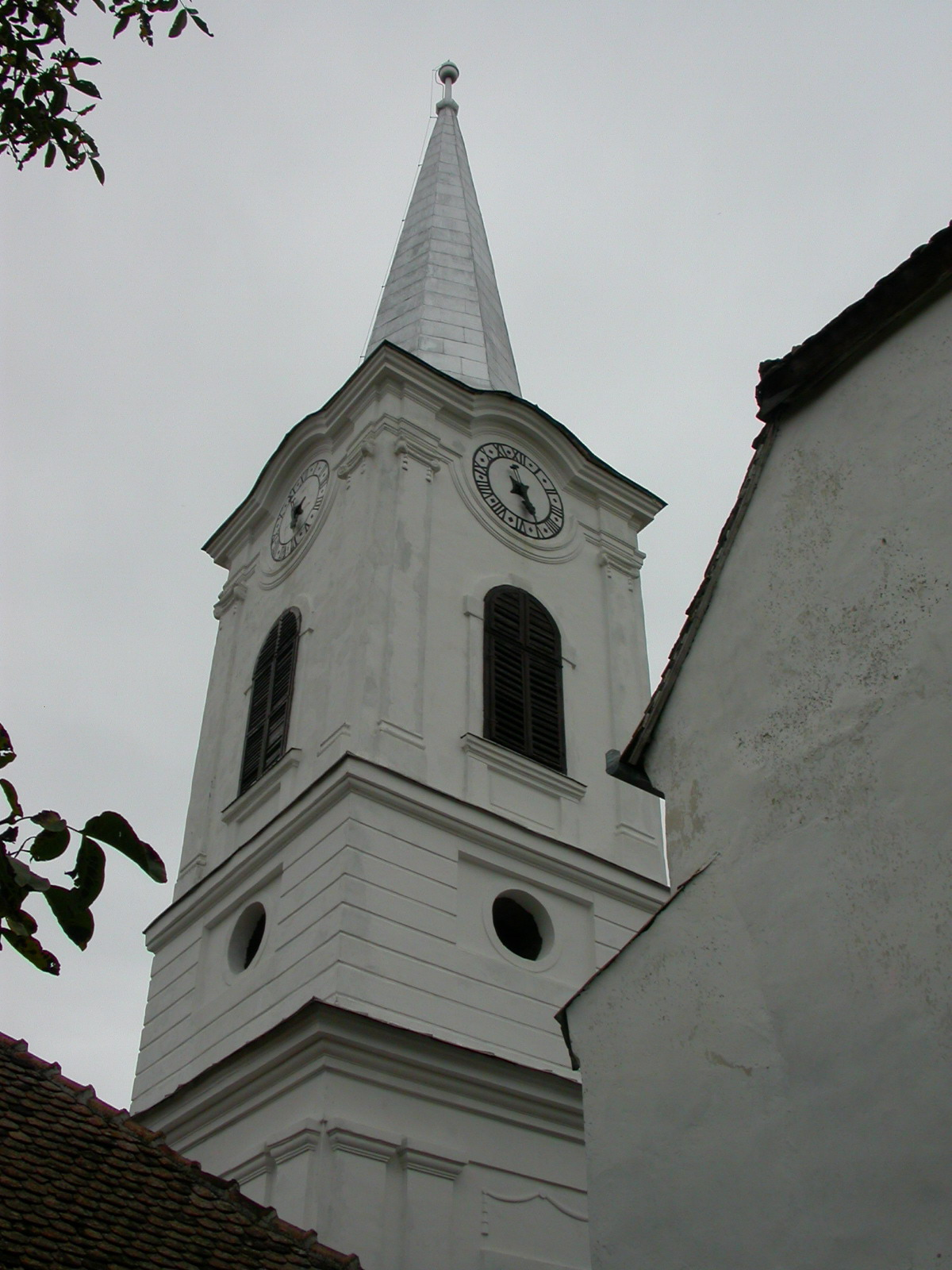 Ansamblul bisericii reformate, sec. XV - înc. sec. XIX